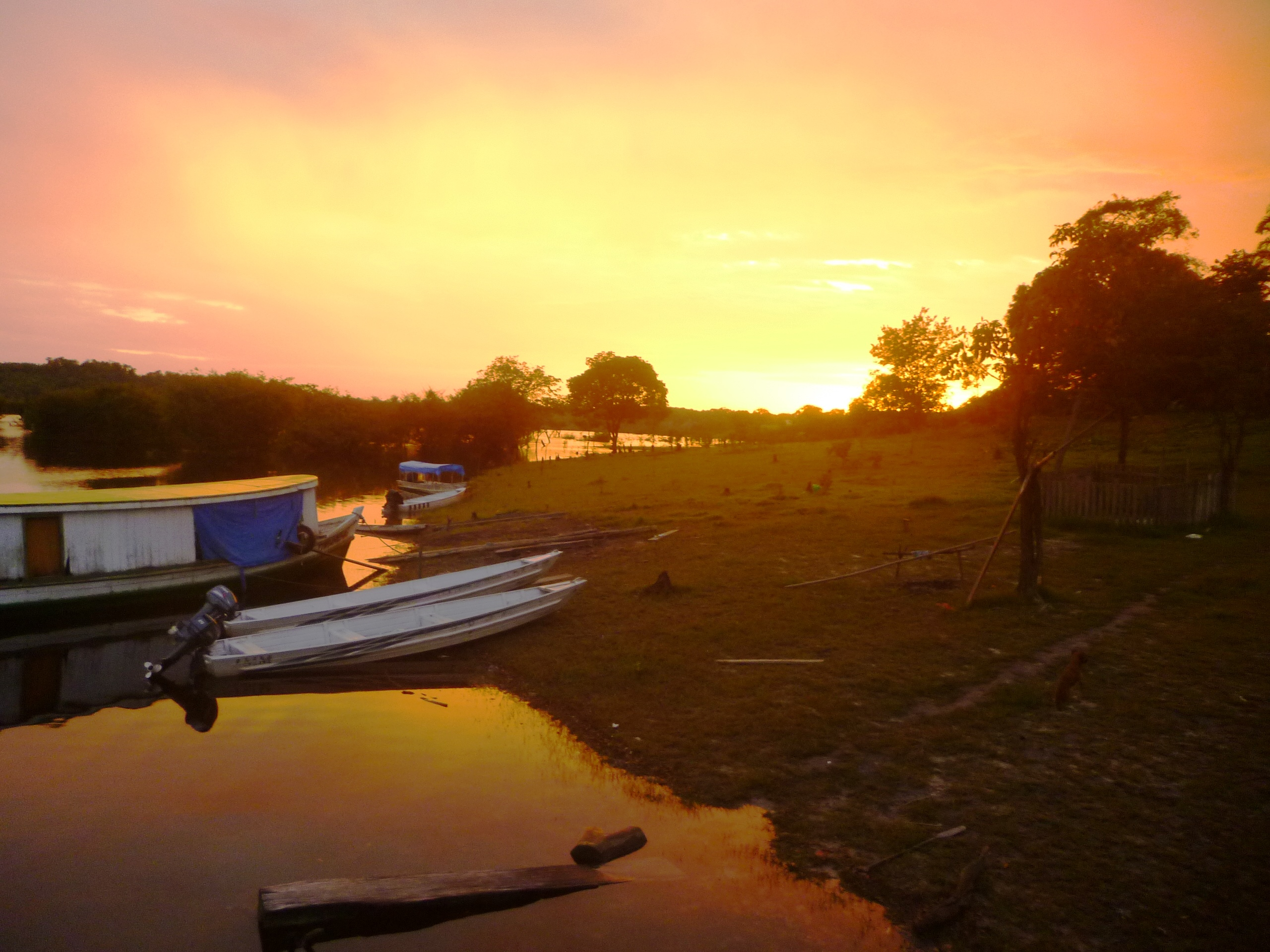 Comunidade indígena no alto Rio Negro